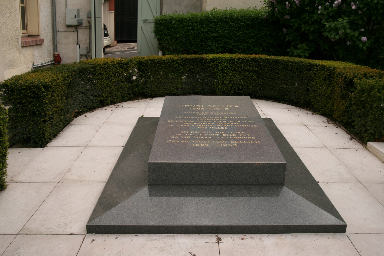 Tombe Henri Sellier au cimetière Carnot de Suresnes